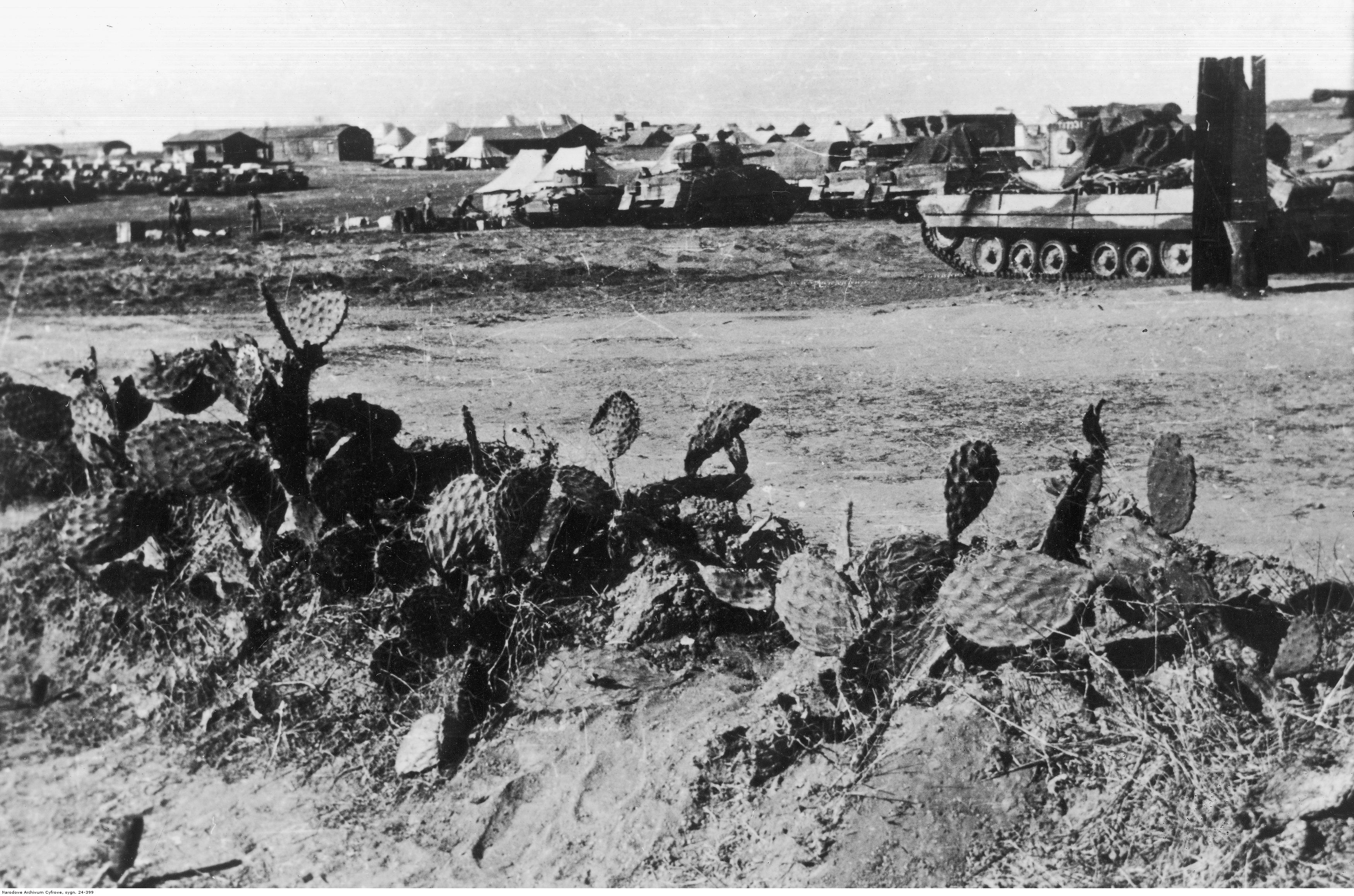 Armia Polska na Bliskim Wschodzie. Obóz 6 Pułku Pancernego "Dzieci Lwowskich" w Palestynie. W głębi widoczne czołgi Sherman M4. Archiwum Fotograficzne Tadeusza Szumańskiego. Sygnatura: 24-399